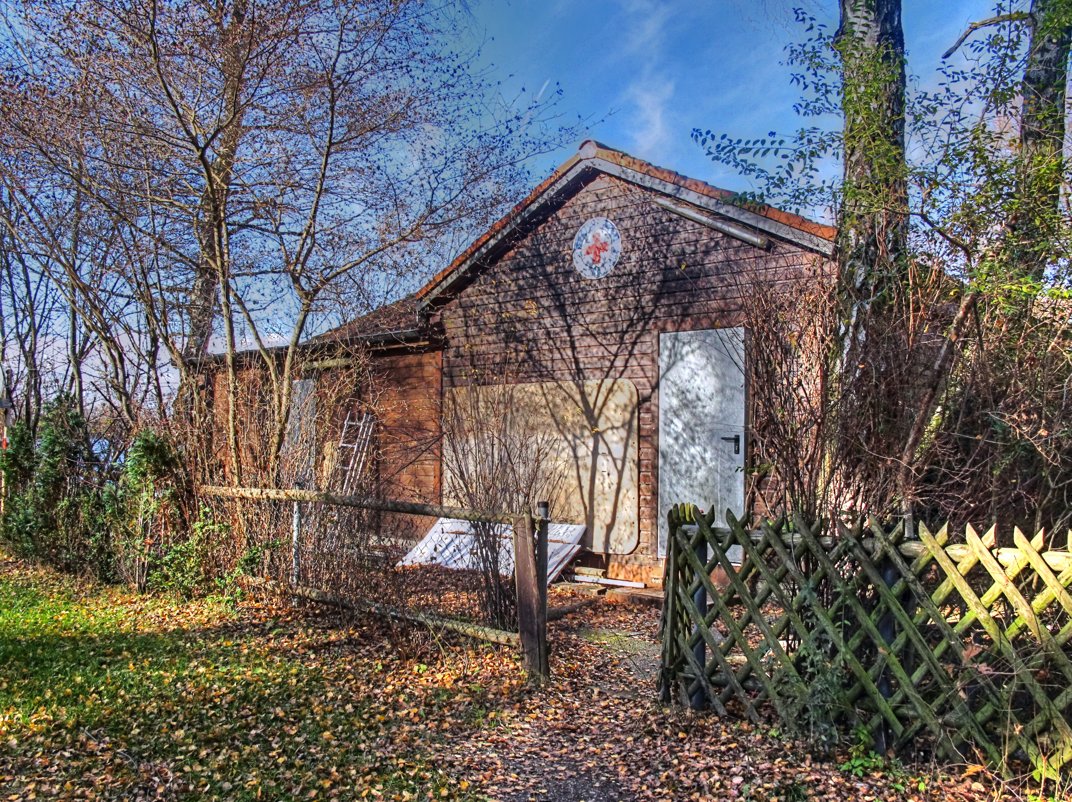 Deutschland, Bayern, Landkreis Fürstenfeldbruck, Olching, Olchinger See, Wasserwachtstation, tone-mapped HDR-Aufnahme